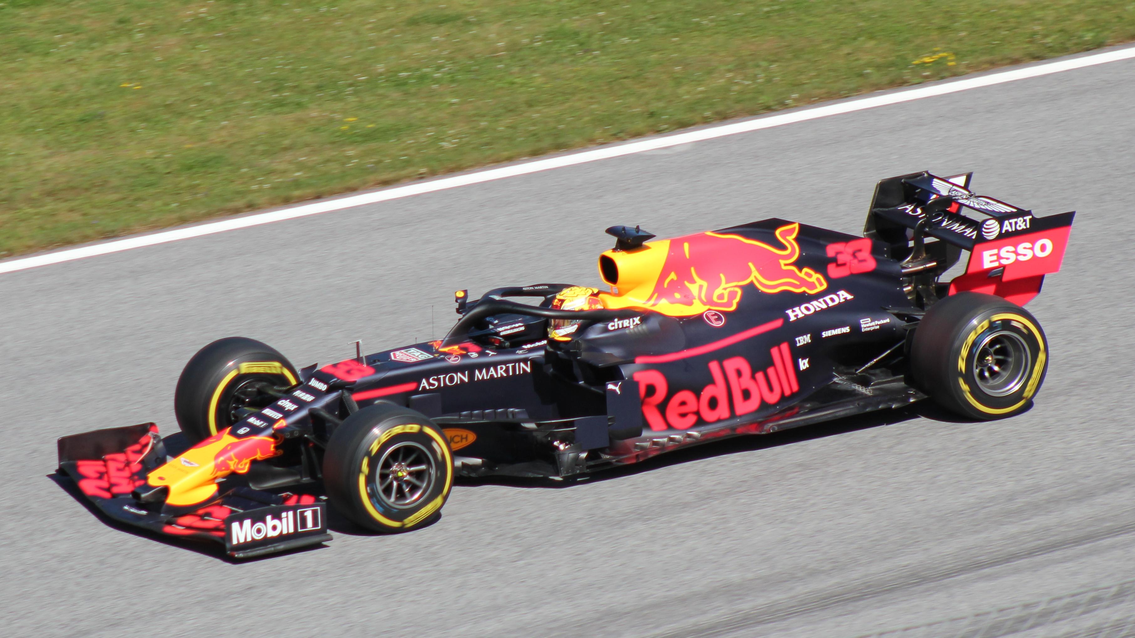 Verstappen beim Rennwochenende in Österreich 2019